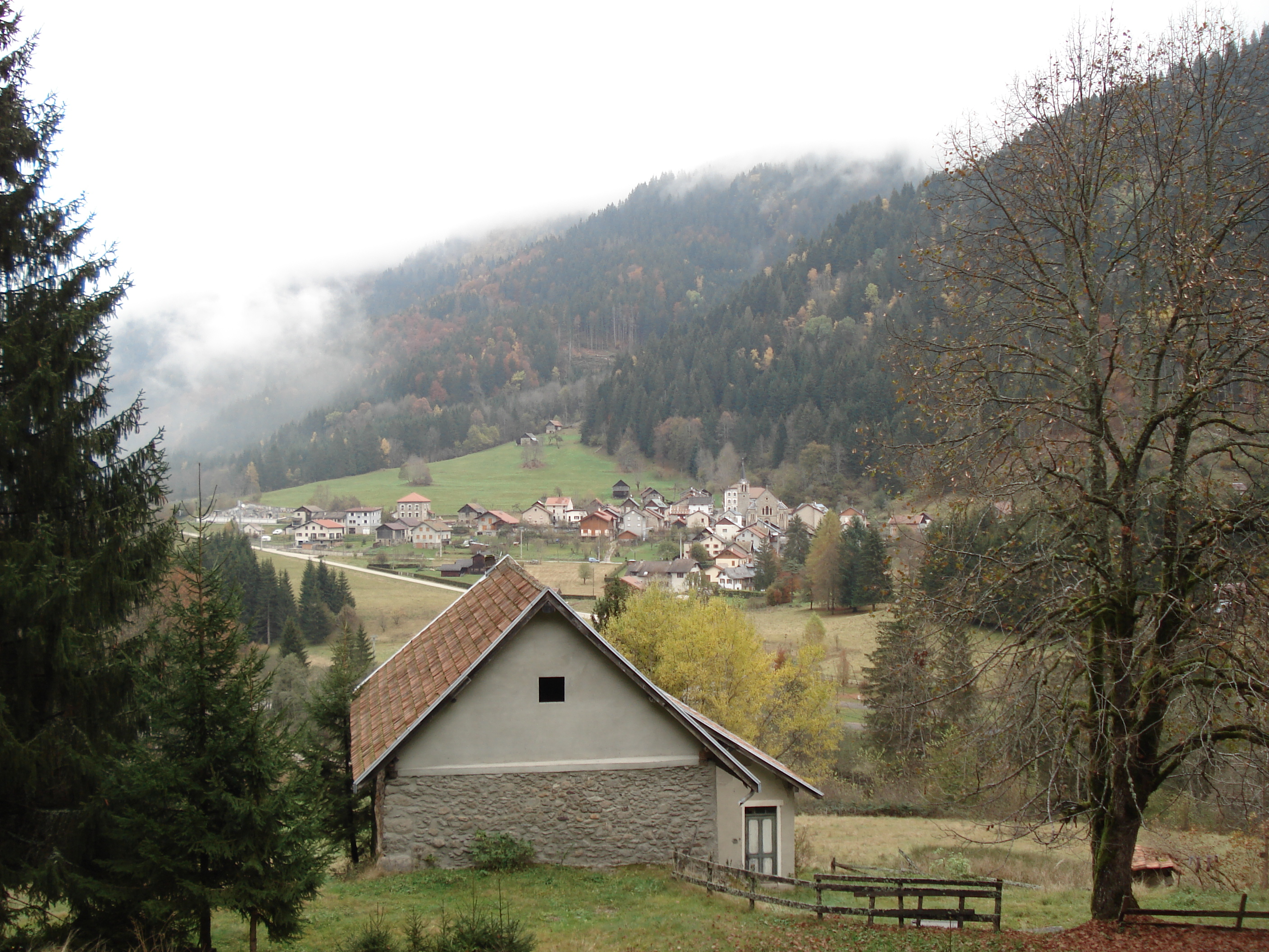 A view of La Ferrière in France Isère